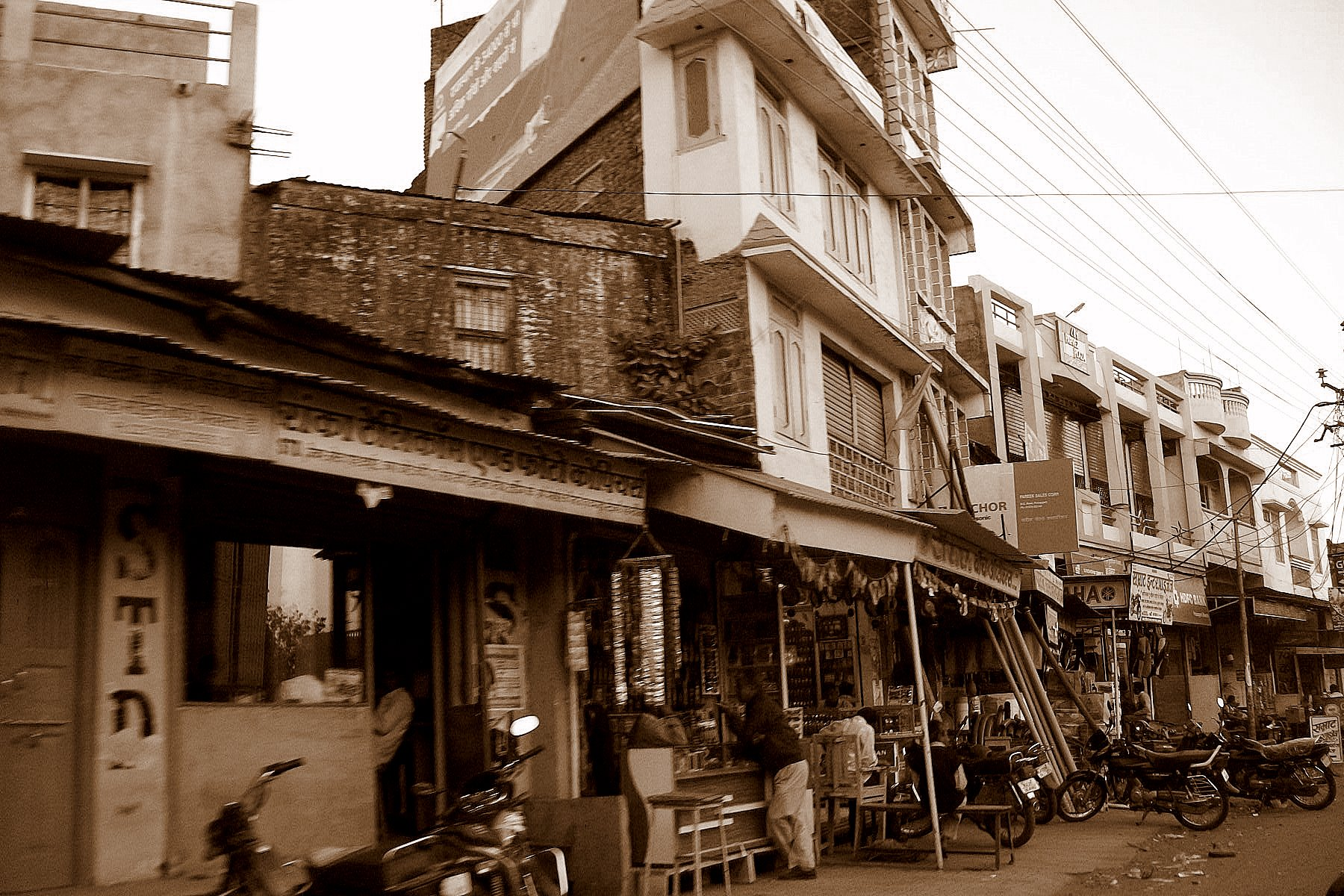 कस्बे की दुकानें, प्रतापगढ़